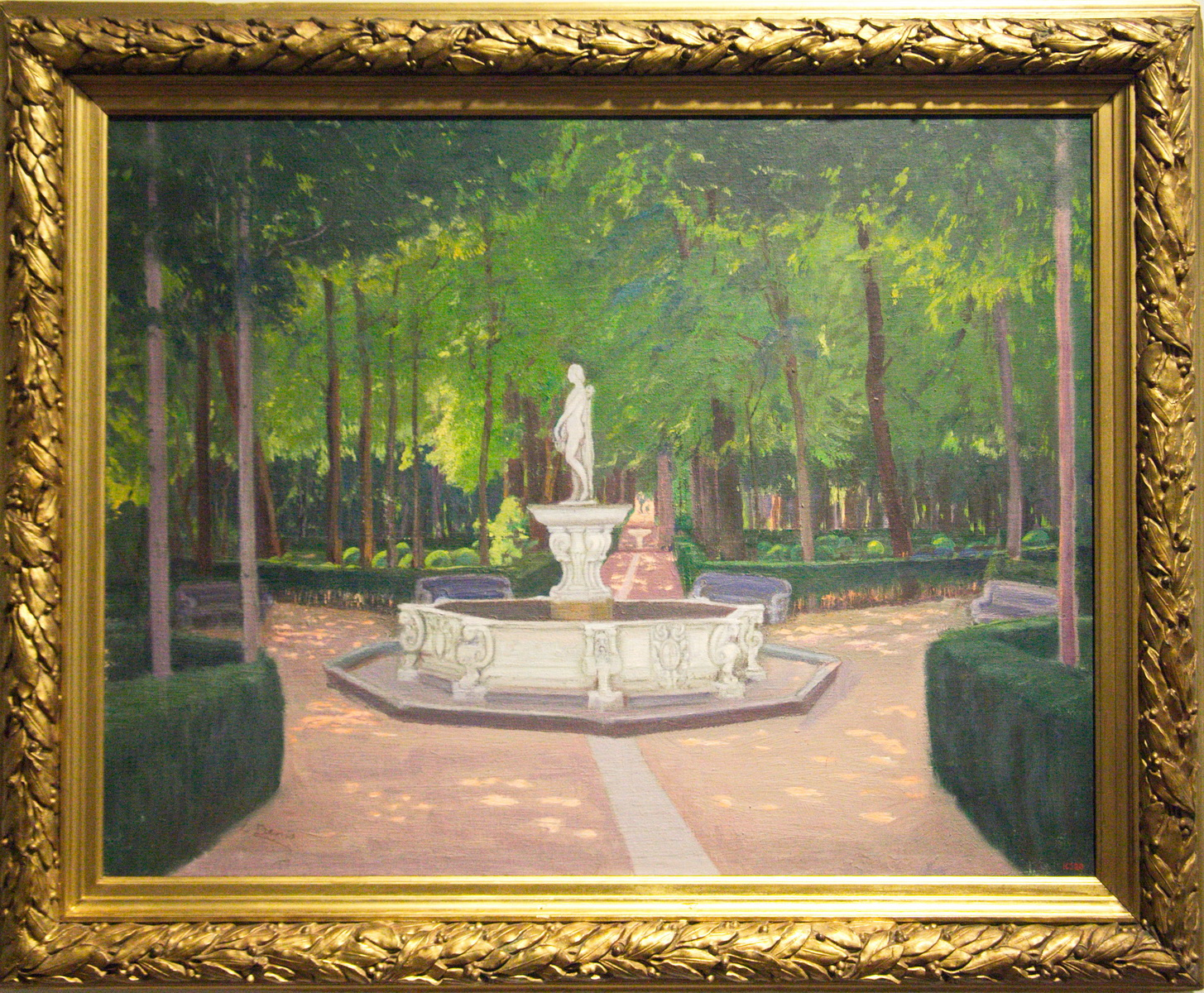 "Jardí de la Isla d'Aranjuez", obra de 1919 de Lluïsa Denís. Conservada al Museu de Maricel de Sitges.